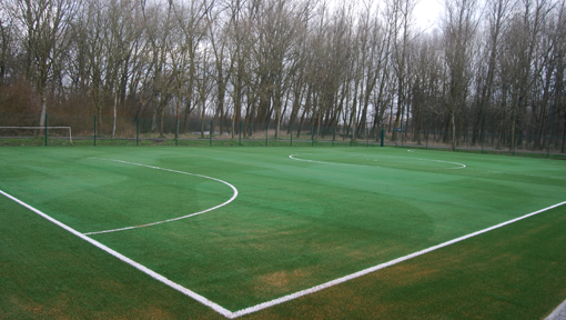 Kunstgras jeugd FCE